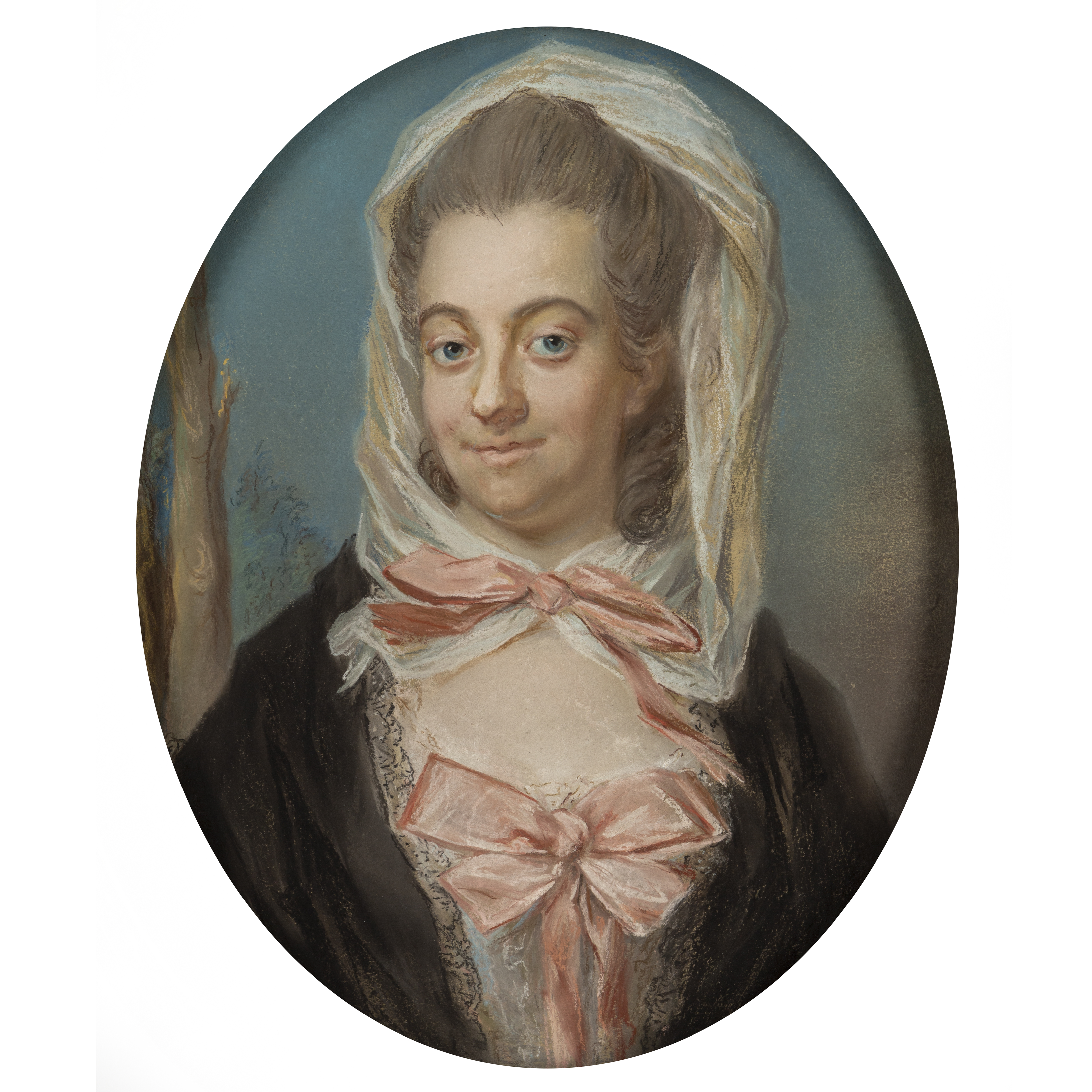 Porträtt av Margaretha af Sandeberg (1757-1831), gift med Carl Johan Gyllenborg. Avporträtterad ca 1785 av Gustaf Lundberg.